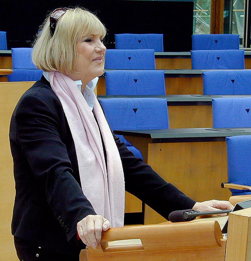 Barbara Dickmann im Wasserwerk in Bonn, 2008